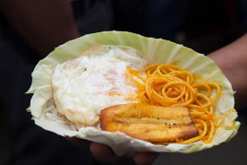 Este plato se caracteriza por su particular presentación, es muy apreciado por los turistas y habitantes de la zona.